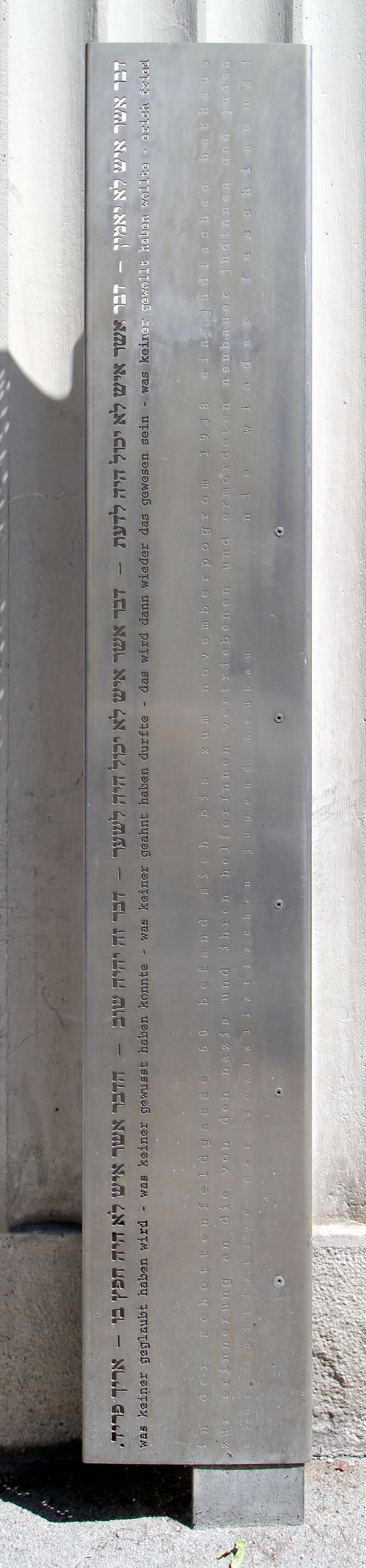 Gedenktafel zur Erinnerung an das Vereinsbethaus Neubau, das 1938 zerstört wurde.